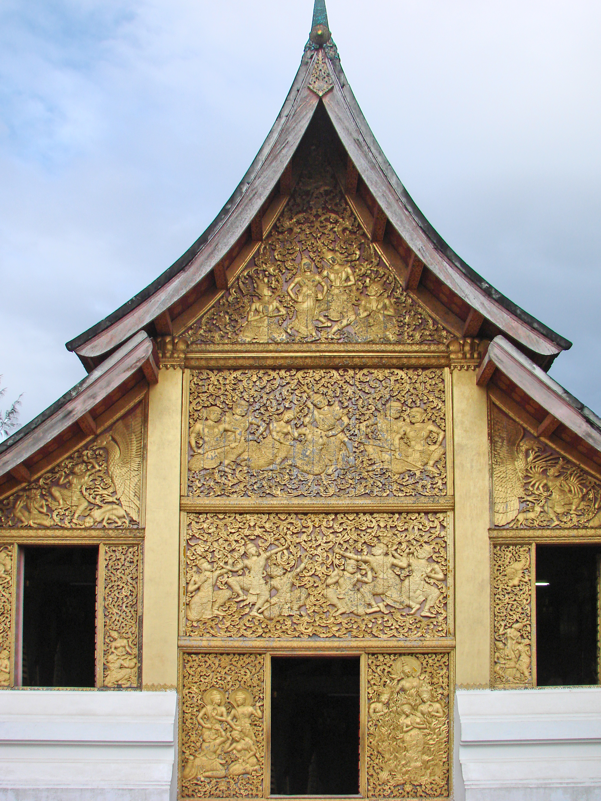 Cette chapelle a été construite en 1962 pour abriter le char et l'urne funéraire du roi Sisavang Vong décédé en 1959. Le thème du décor de bois sculpté est le Ramayana dans sa version siamoise. Au-dessus de la porte centrale, au 1er niveau : Rama et Sita avec Laksmana et Vibhisana. Au 2ème niveau : Ravana blessé expire dans les bras de Nang Mandadori et de son frère Vibhisana. Au 3ème niveau, Rama et ses alliés Laksmana et Hanuman affrontent Ravana et deux Raksa.